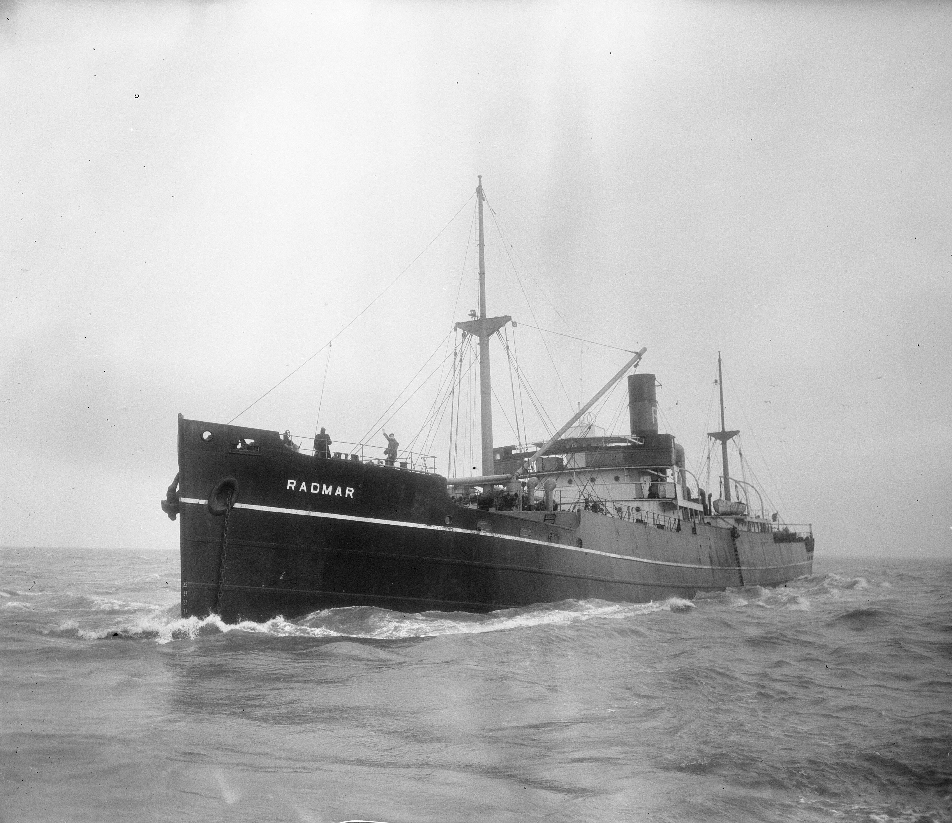 Collectie / Archief : Fotocollectie Anefo Reportage / Serie : [ onbekend ] Beschrijving : Engelse Ss. Radmar op zandplaat Hoek van Holland Datum : 19 januari 1952 Locatie : Hoek van Holland Instellingsnaam : SS Radmar Fotograaf : Duinen, […] van / Anefo Auteursrechthebbende : Nationaal Archief Materiaalsoort : Glasnegatief Nummer archiefinventaris : bekijk toegang 2.24.01.09 Bestanddeelnummer : 904-9248